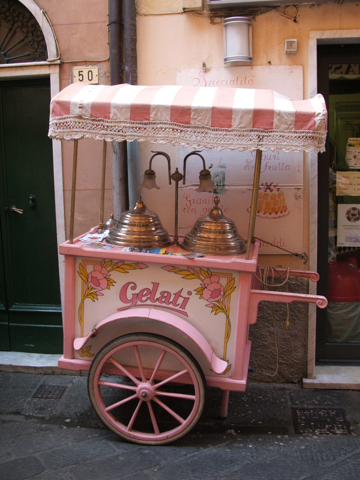 Immagine da Sestri Levante